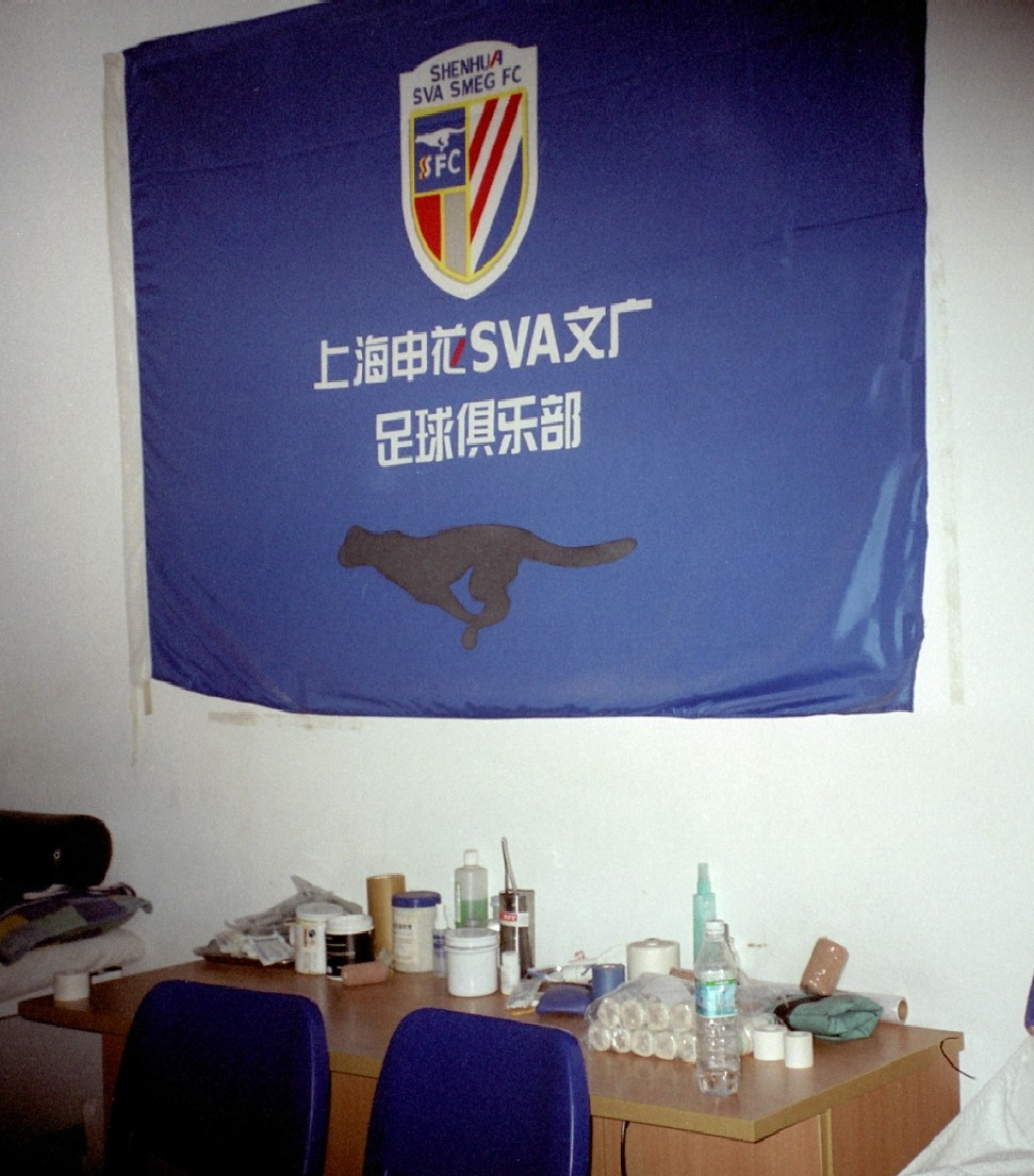 vlag met logo